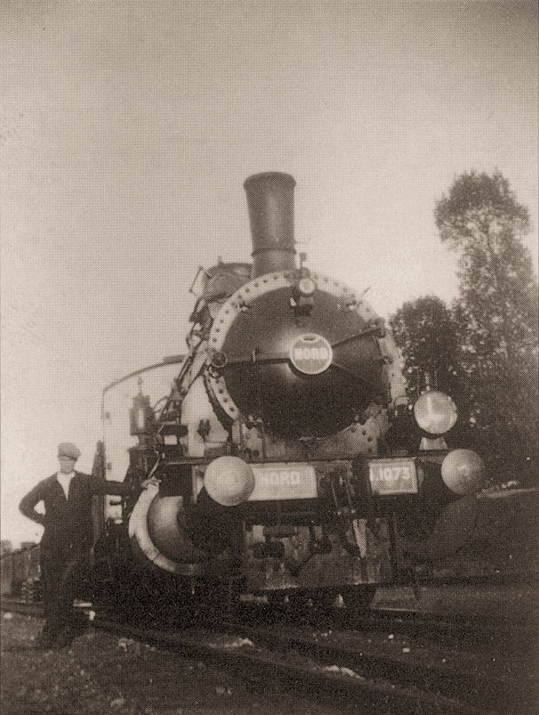 Un marchandises en gare de Saint-Saëns, milieu des années 1930